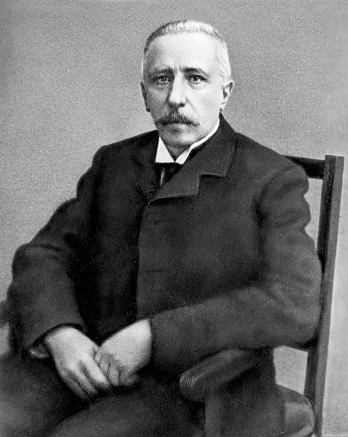 Павел Григорьевич Курлов, товарищ министра внутренних дел и командир отдельного корпуса жандармов Российской империи